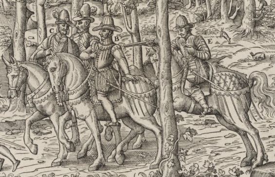 Assassinat du Duc de Guise, 18 février 1563. Il meurt le 24 février suivant. Gravure réalisée par Tortorel et Perrissin, vers 1570. B = Duc de Guise. E = Jean de Poltrot de Méré.